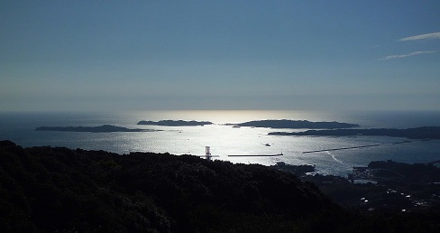 渡良三島 （岳ノ辻からの眺め）